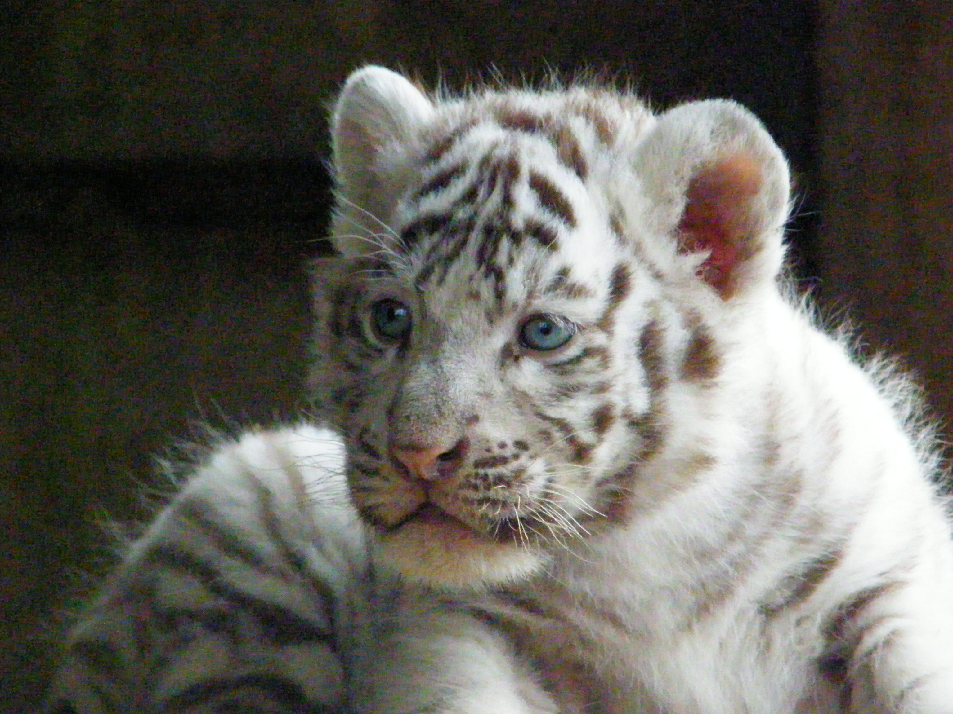 Bébé tigre blanc, ZooParc de Beauval, Saint-Aignan, Loir-et-Cher, France